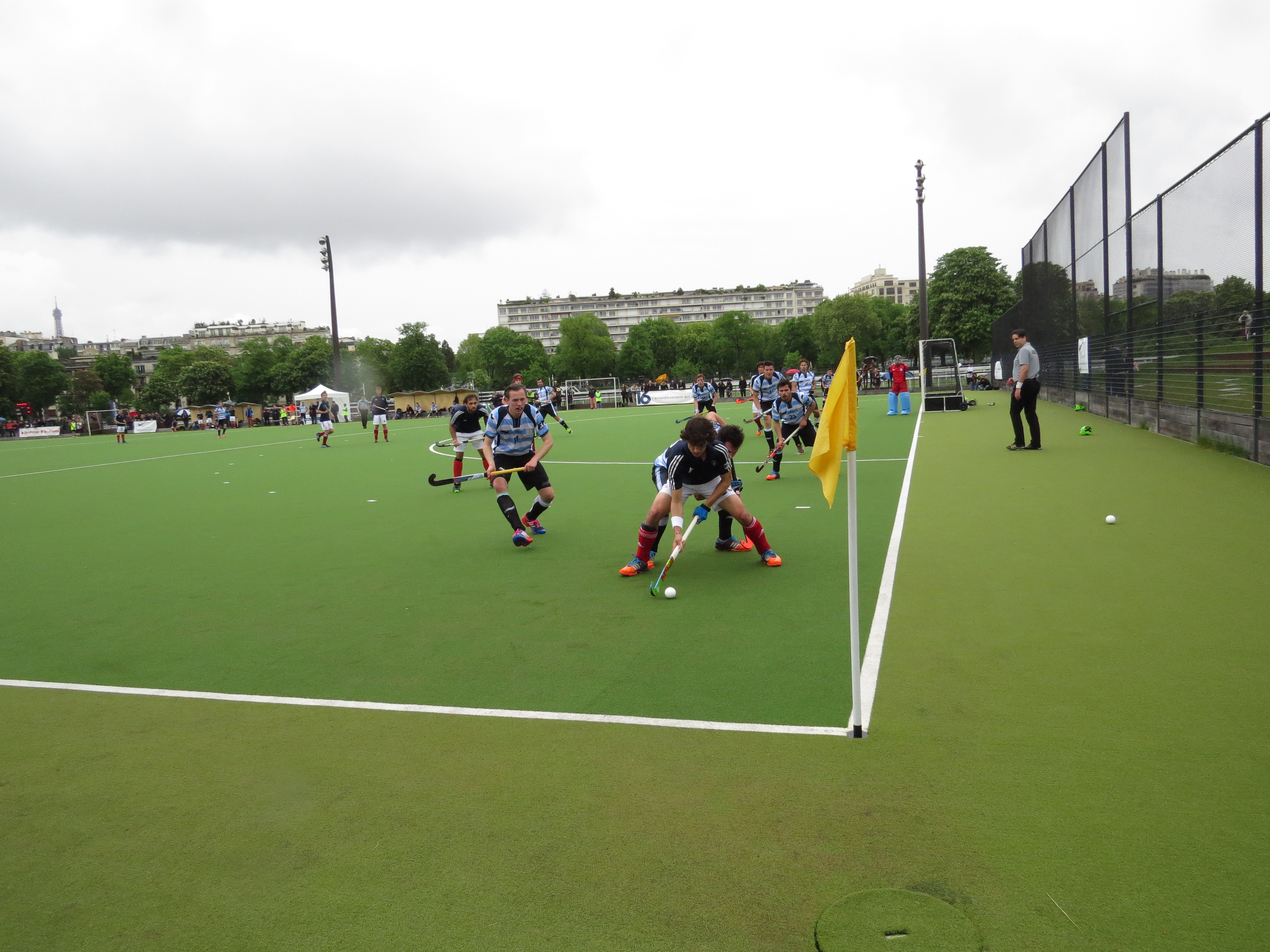 Finale du championnat de France masculin de hockey sur gazon 2014-2015 sur le terrain du PJB Victoire du Racing 3-1